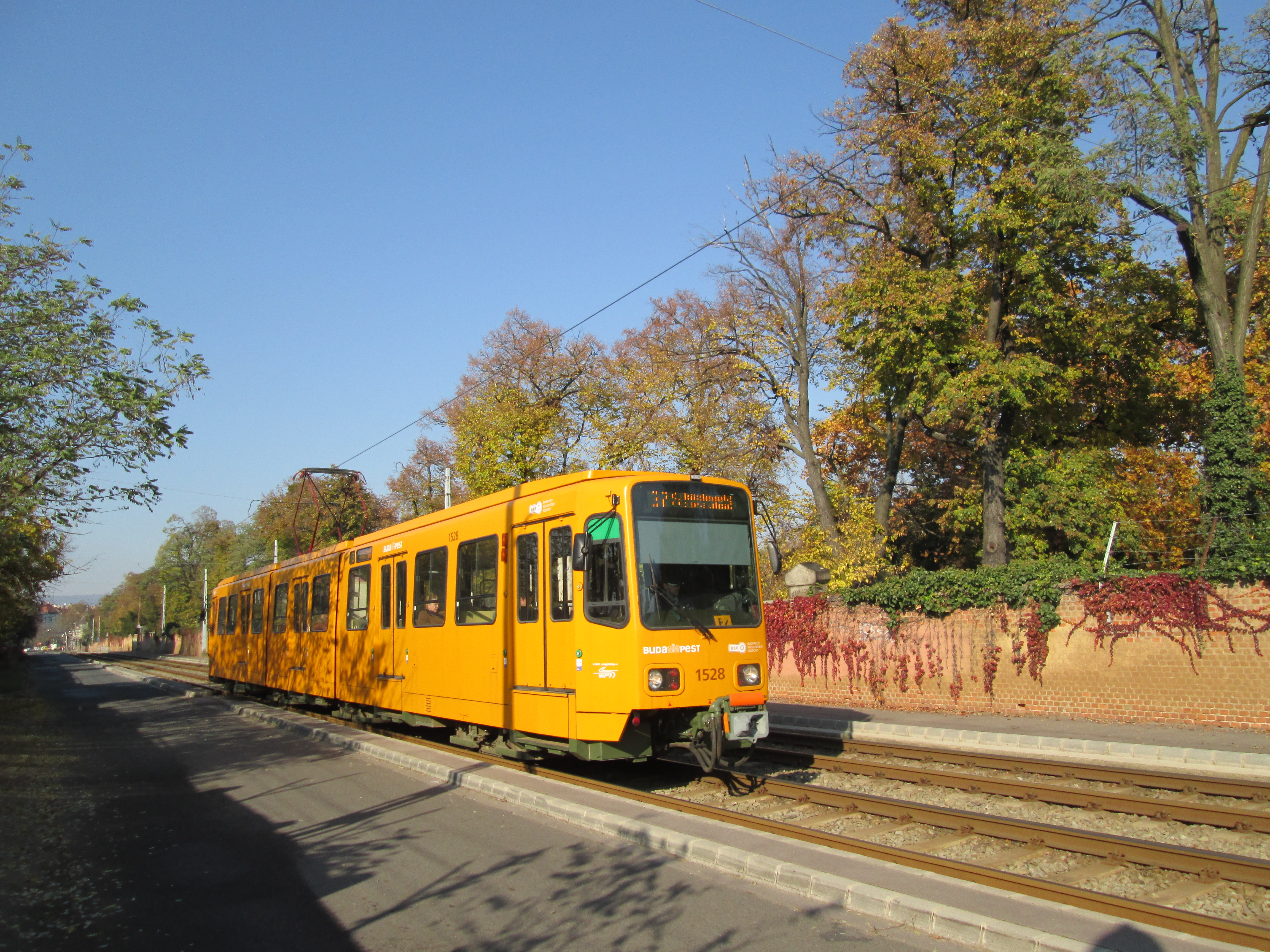 Az 1528-as pályaszámú Duewag TW 6000-es típusú villamos a 37-es vonalán a Salgótarjáni utcában (Budapest VIII.)